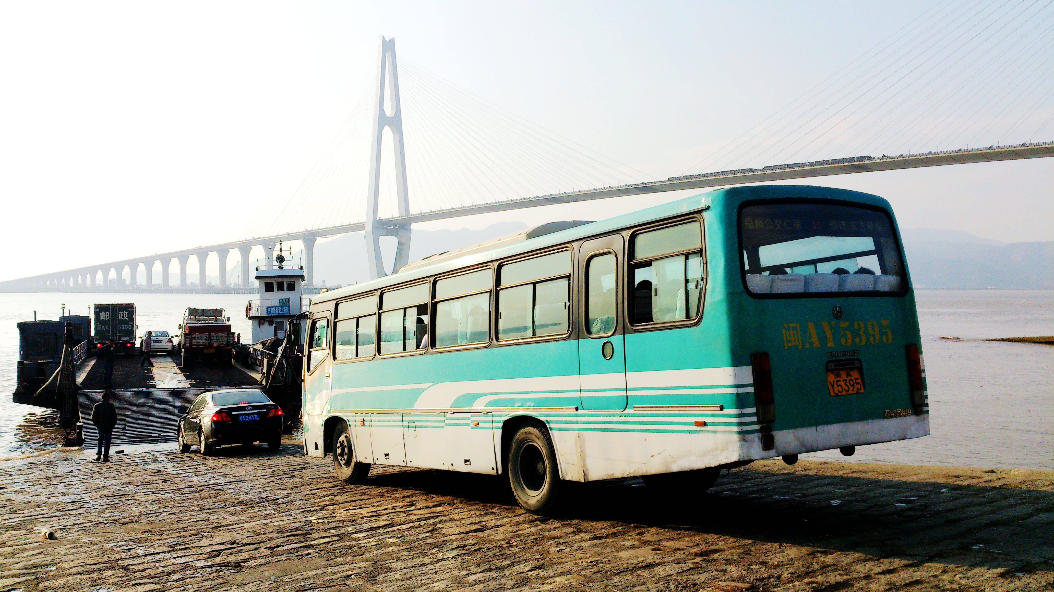 大桥未开通前的东岐码头